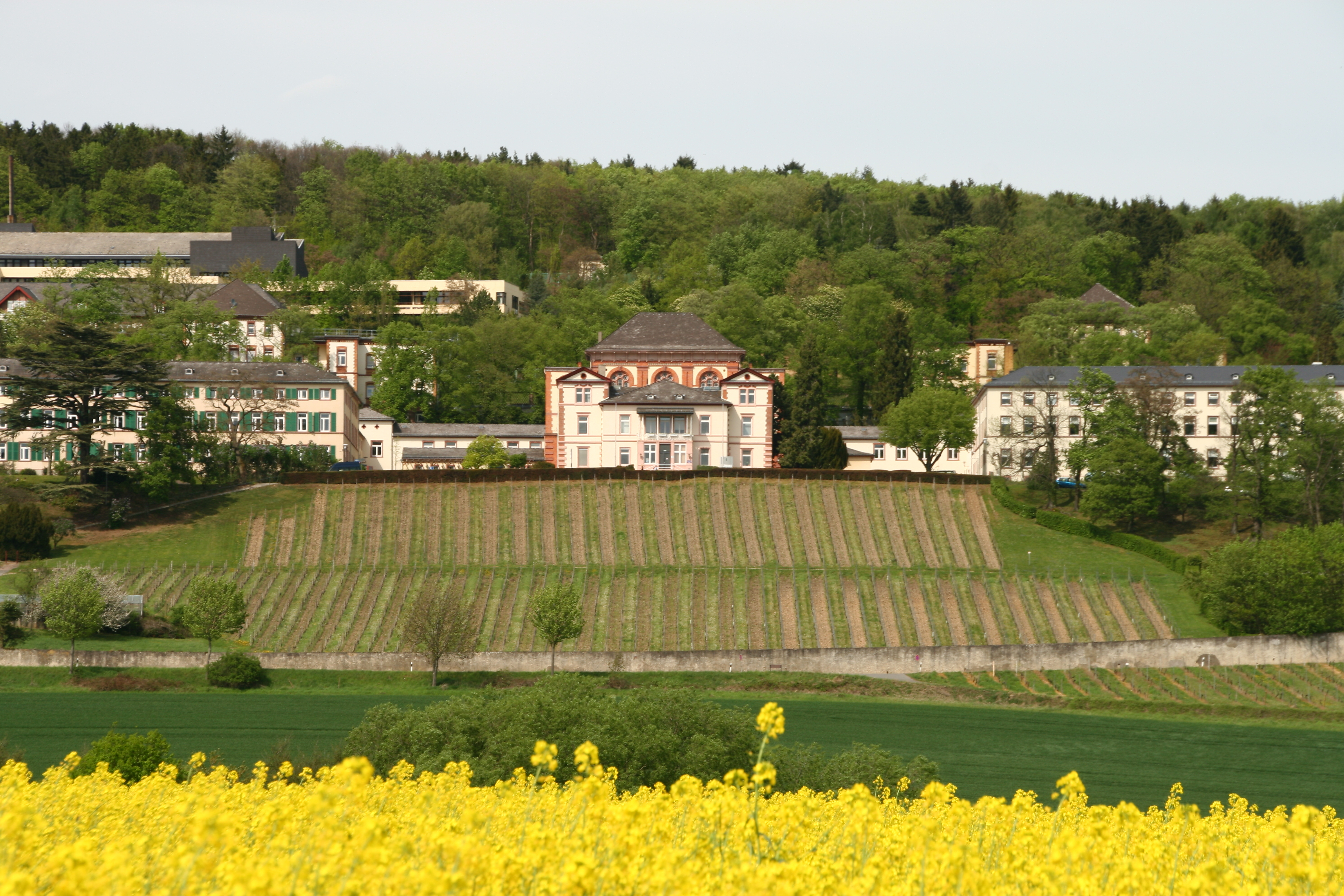 Psychatrische Klinik Eichberg, Eltville am Rhein.